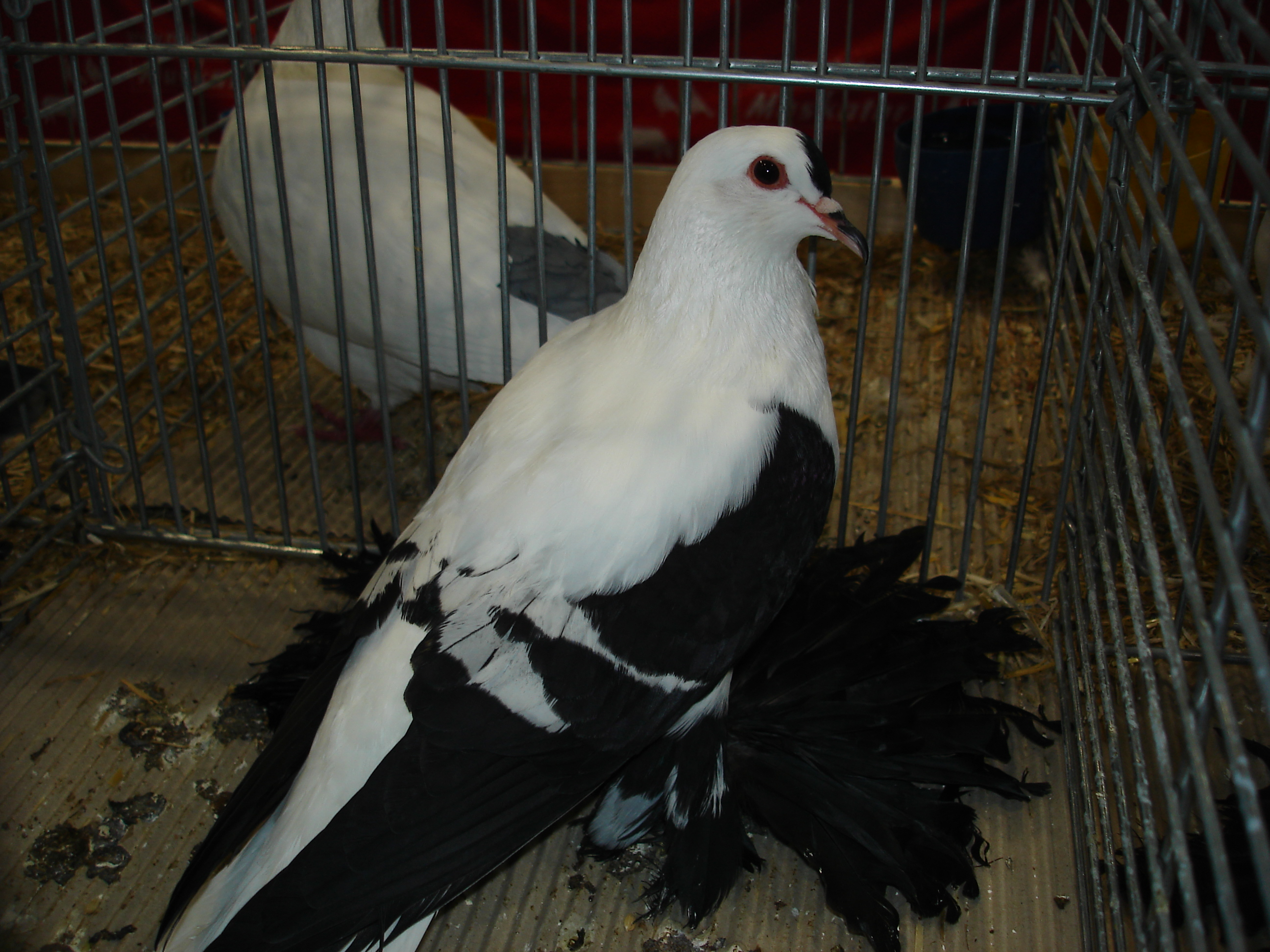 Zdjęcie saksońskiej czajki (śląskiej)